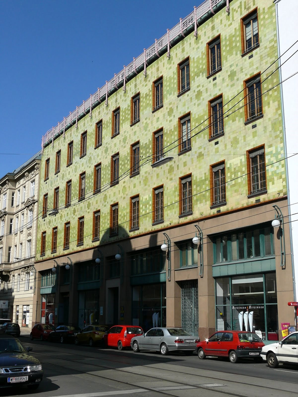 Portois und Fix